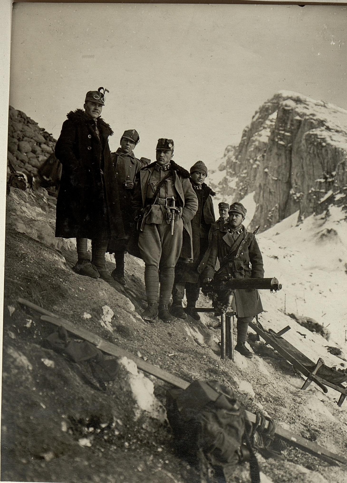 Die den Angriff auf die Cuklastellung kommandierenden Offiziere mit einem eroberten italienischen Maschinengewehr.